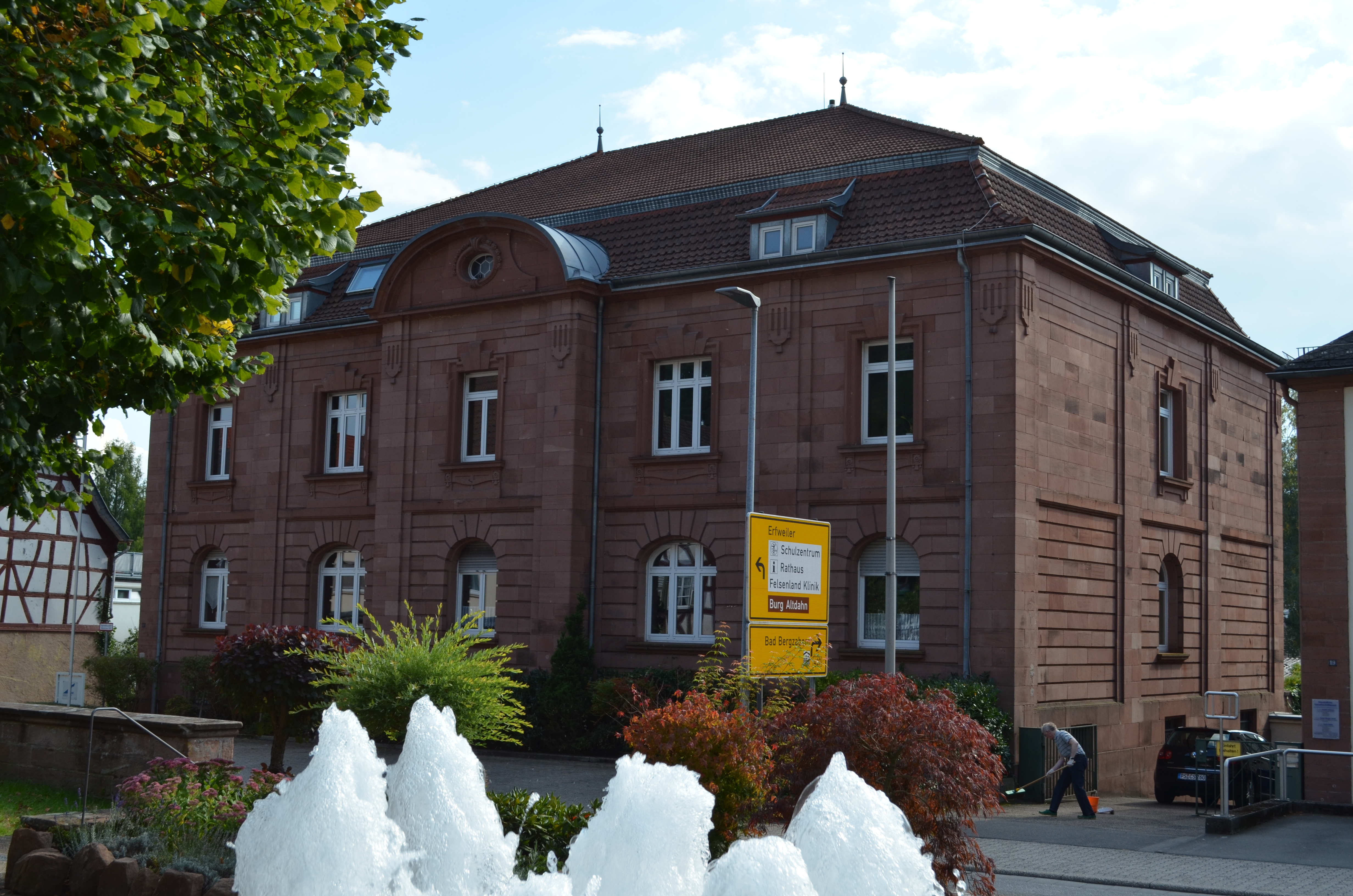 Pirmasenser Straße 17 in Dahn: ehemaliges Amtsgericht; repräsentativer Mansarddachbau, Neubarock, um 1905/1910